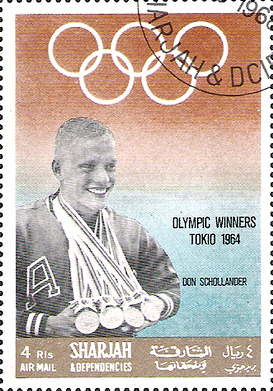 Don Schollander